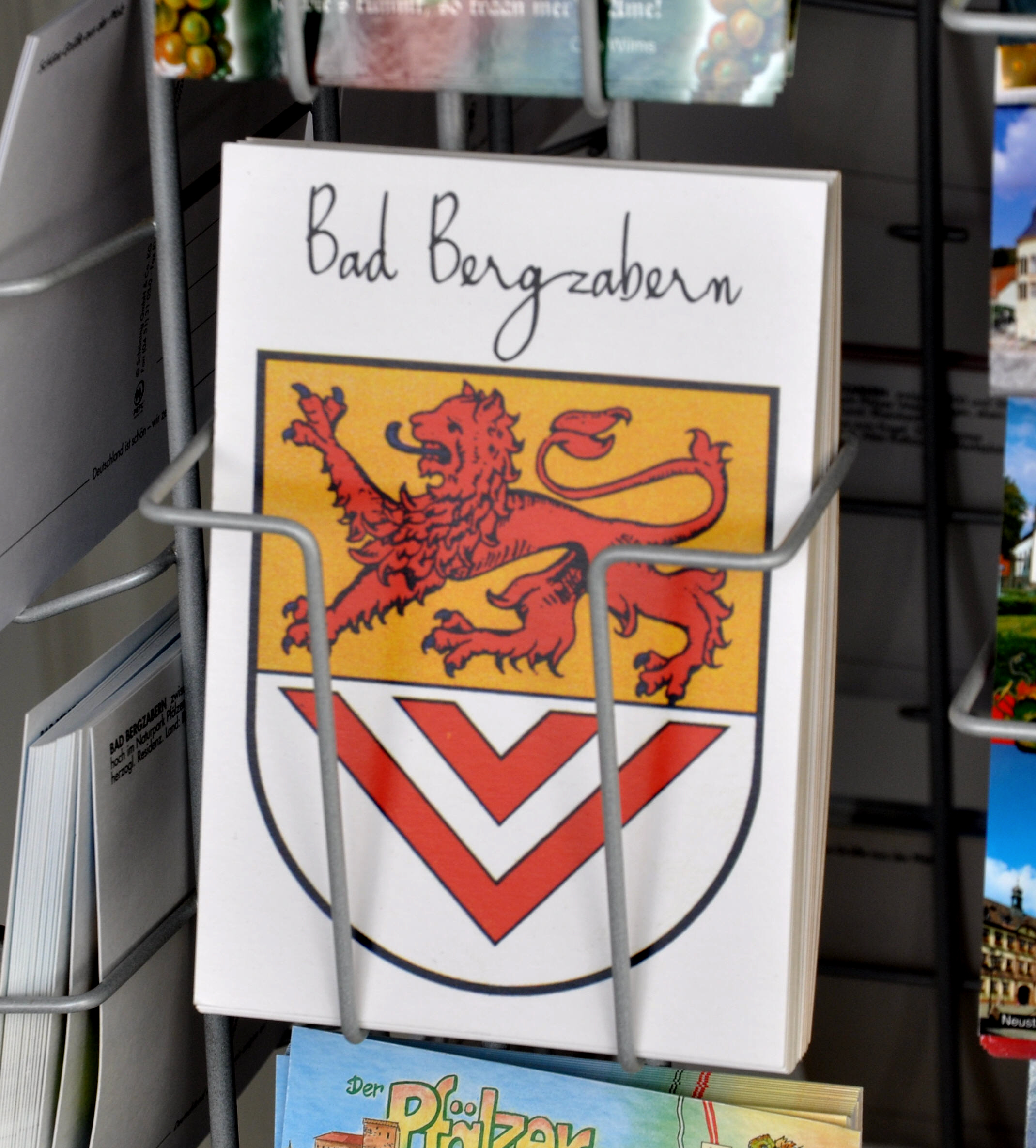 Bad Bergzabern, Postkarte mit dem Stadtwappen in einem Verkaufsständer